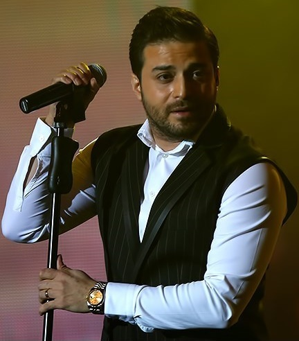 بابک جهانبخش